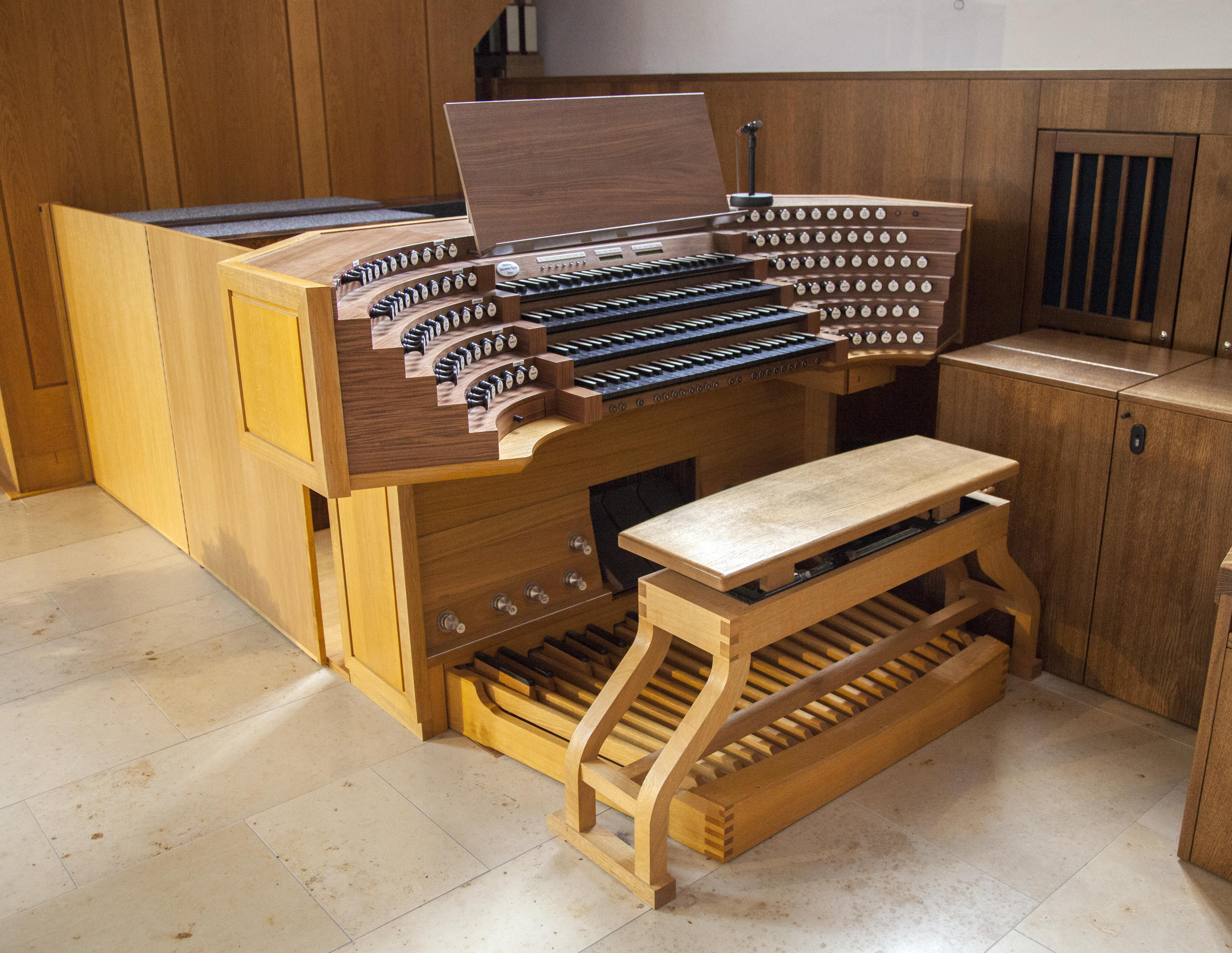 Dionysius, Rheine - neuer Spieltisch 3